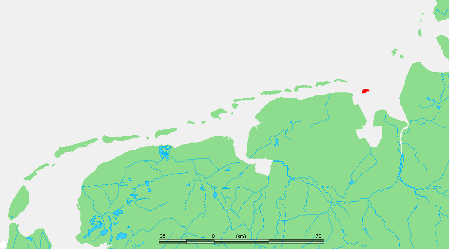 Wadden - Mellum